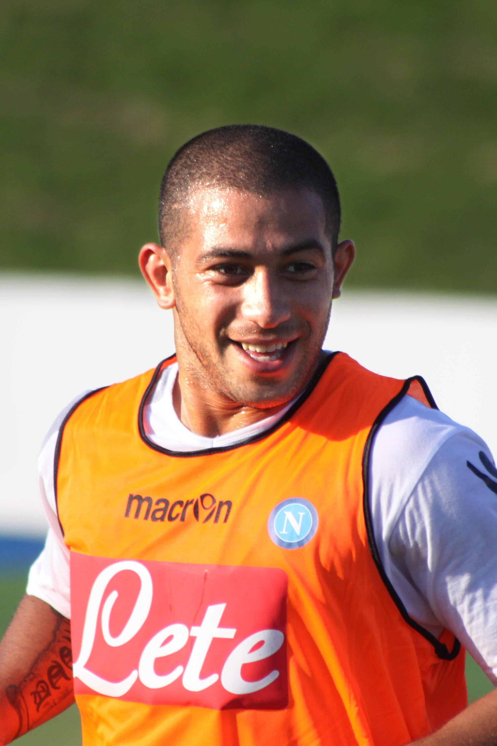 Walter Gargano - SSC Neapel (1) Walter Gargano - Società Sportiva Calcio Napoli